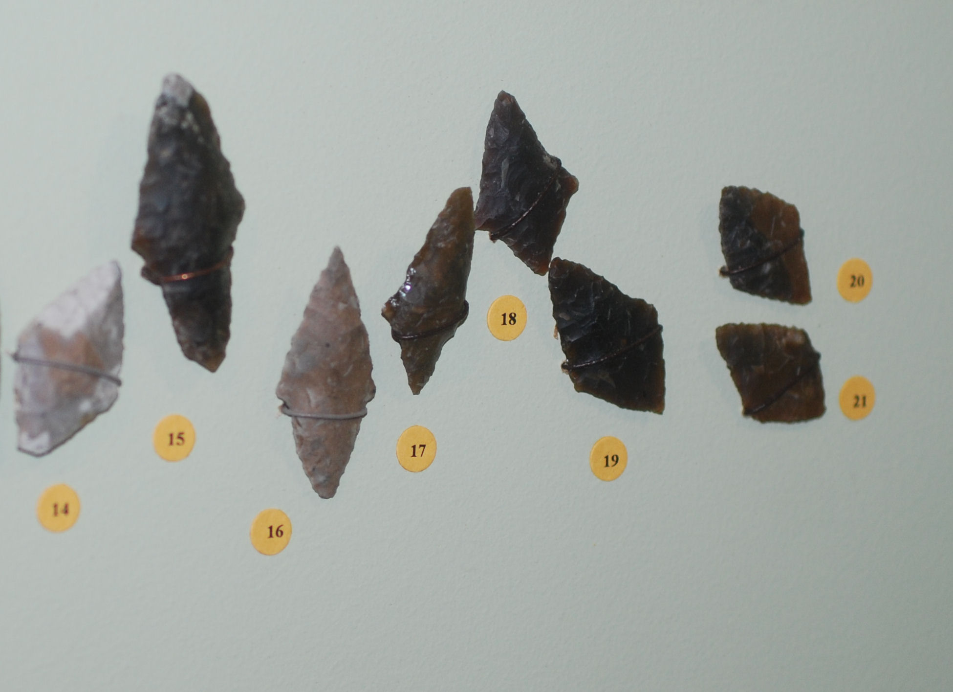 Sārnates apmetnes atradumi. Bultu krama uzgaļi. (Latvijas Nacionālais Vēstures muzejs).